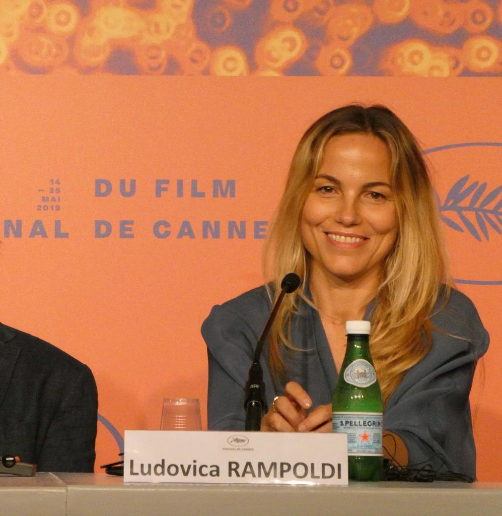 Ludovica Rampoldi in conferenza stampa al festival di Cannes